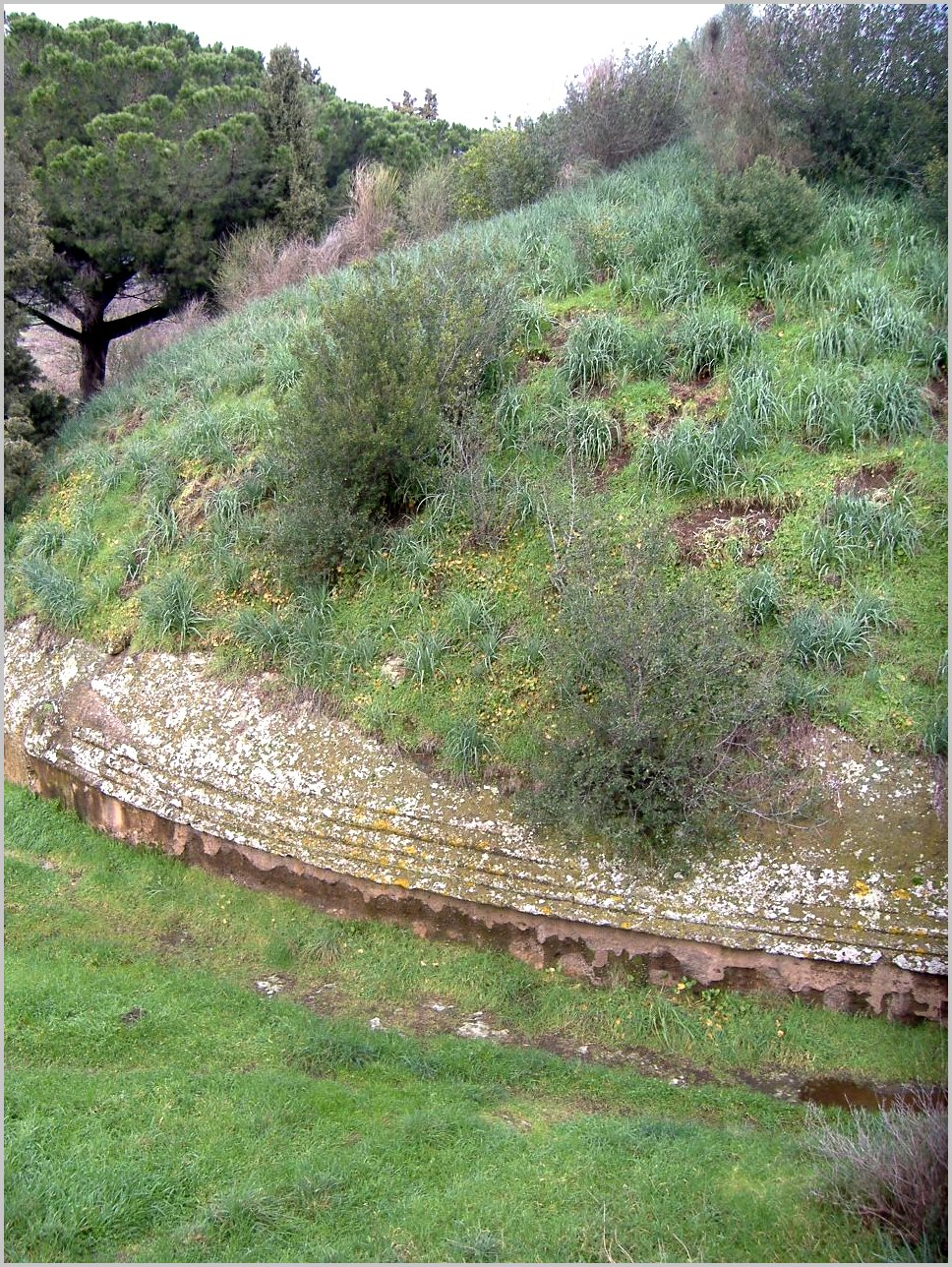 Etruscan tomb